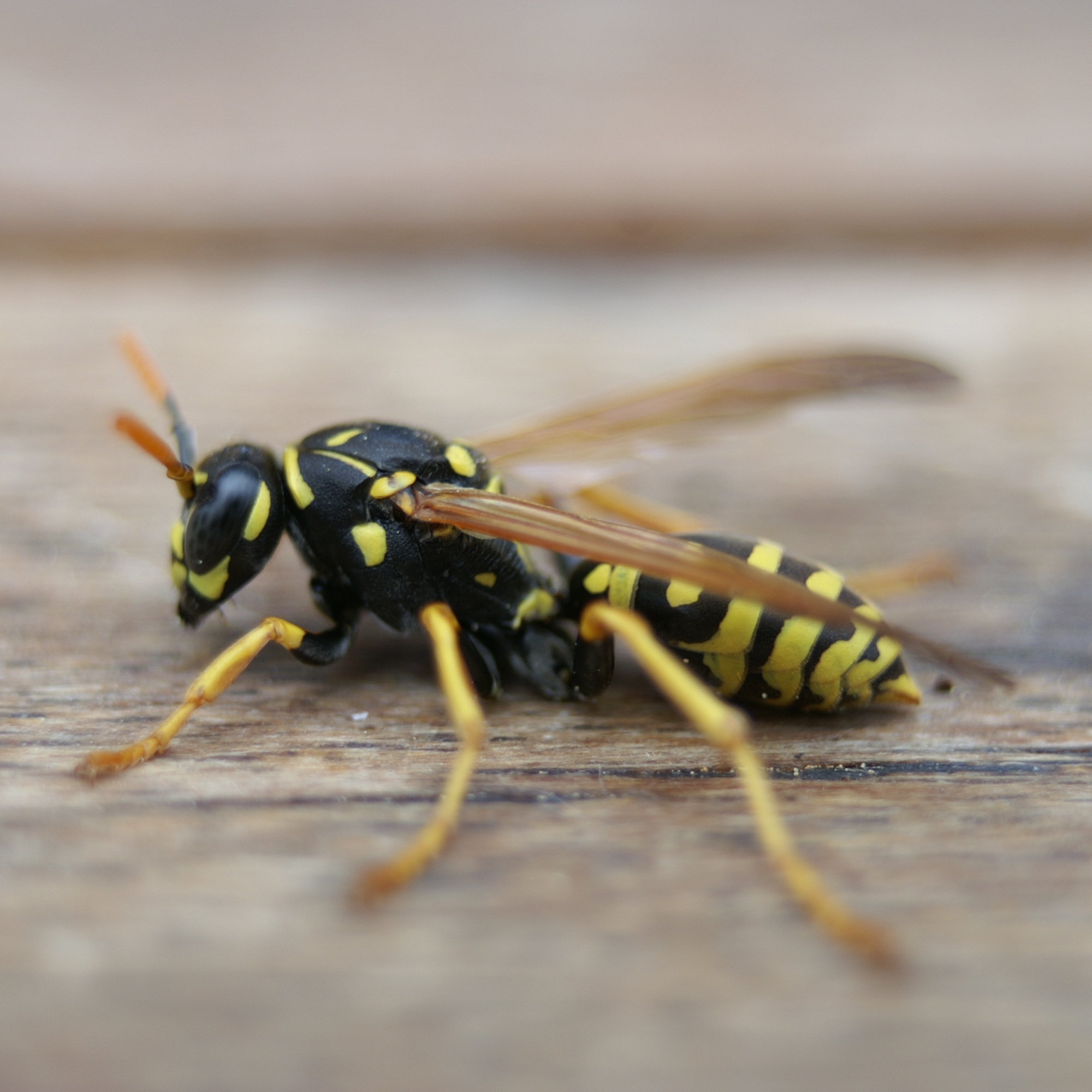 Gallische Feldwespe oder Französische Feldwespe, Polistes dominula